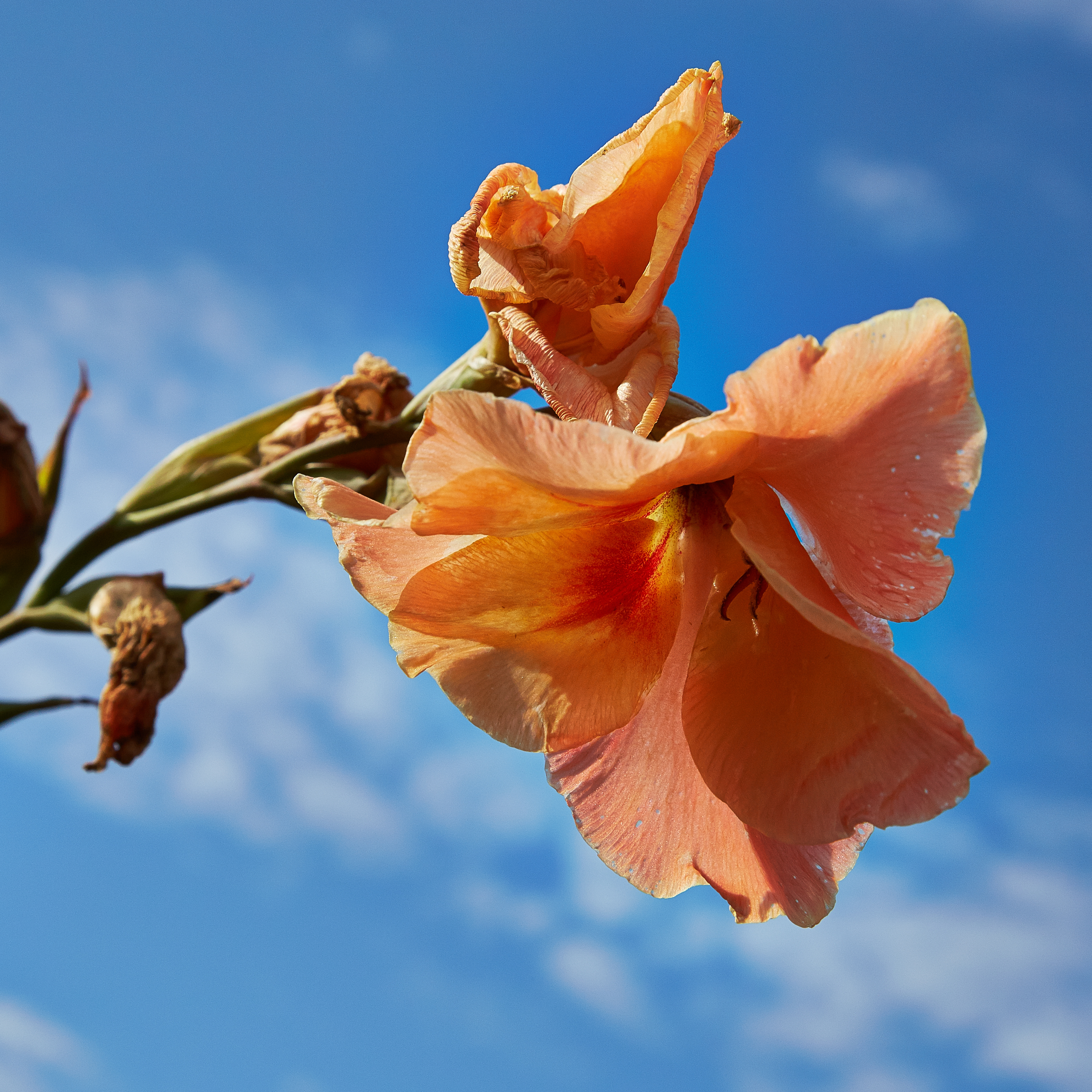 Gladiolus hortulanus 'Trader Horn' identifierad med hjälp av skylt i Bergianska trädgården.